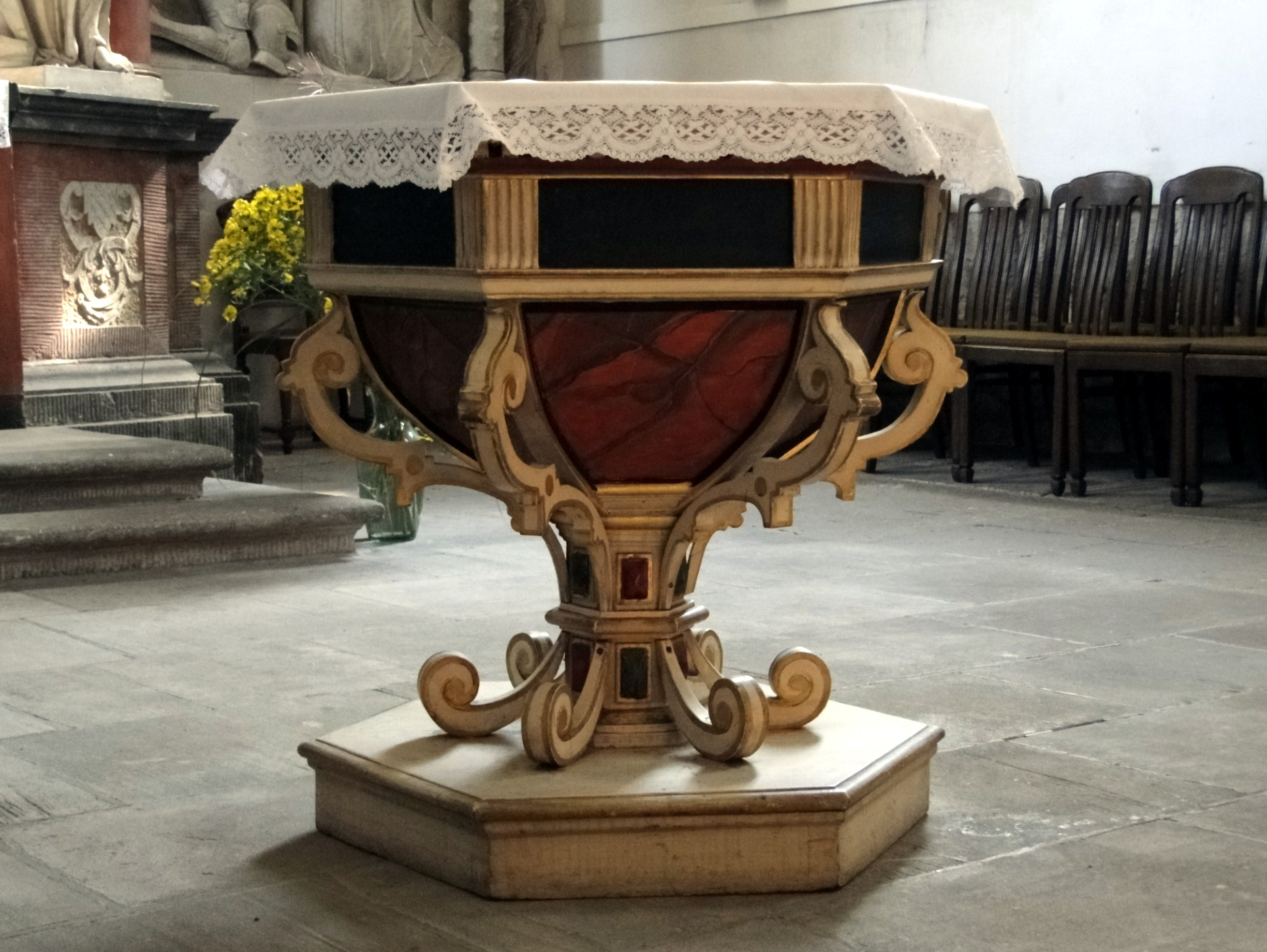 Taufe Kirche Leubnitz-Neuostra